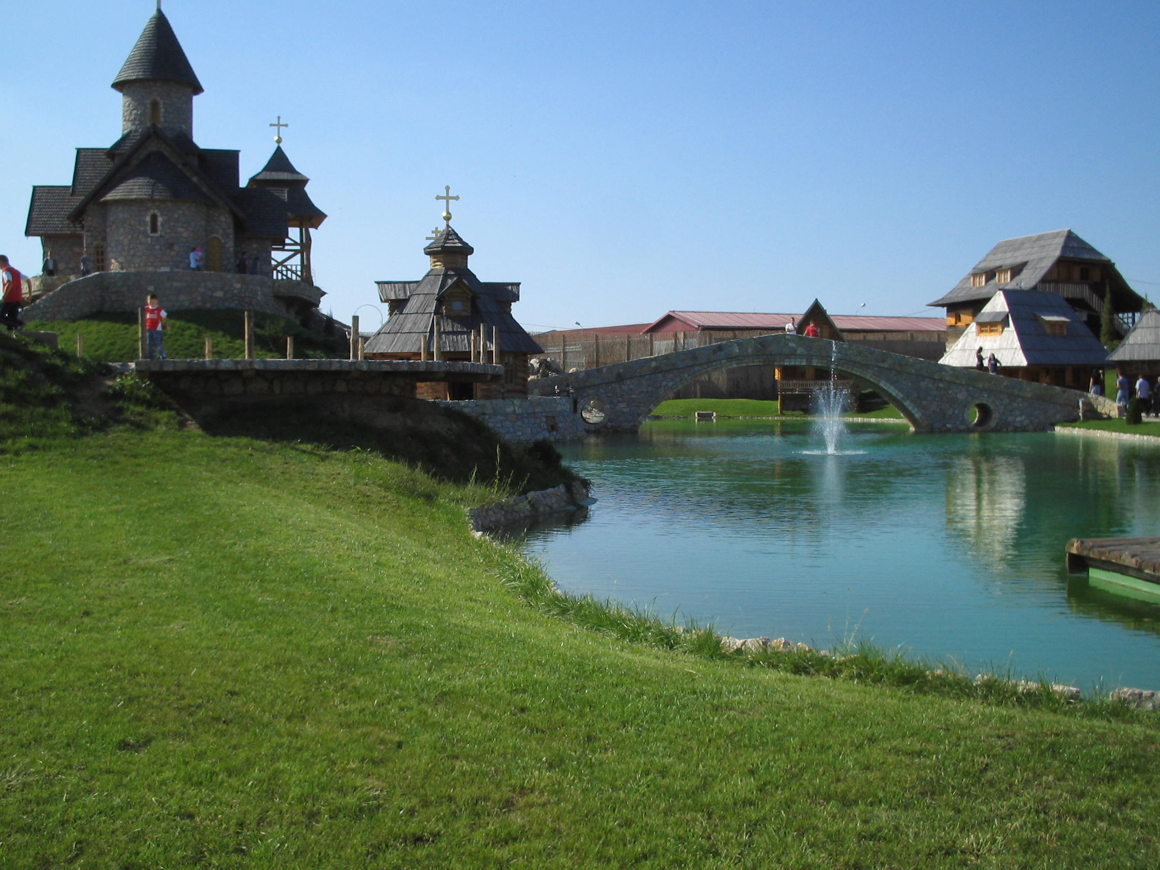 Манастир светог оца Николе